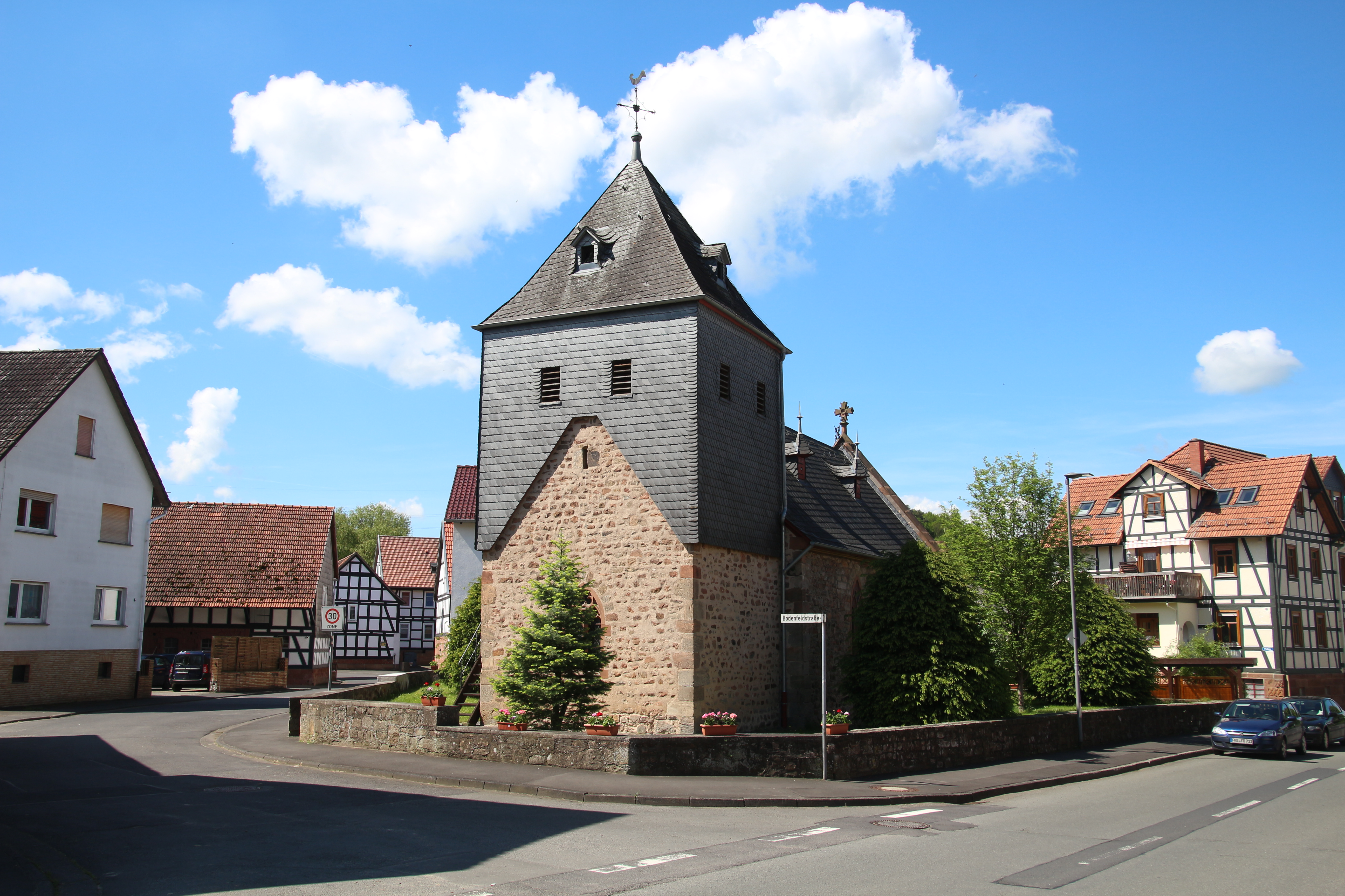 Siehe Bild und Dateiname